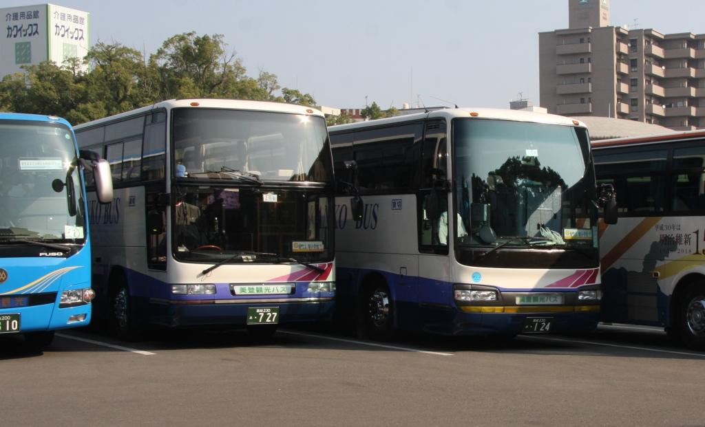 美登観光バスの貸切車